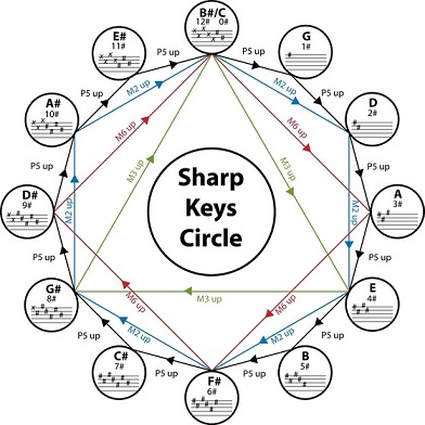 Квинтов и квартов кръг